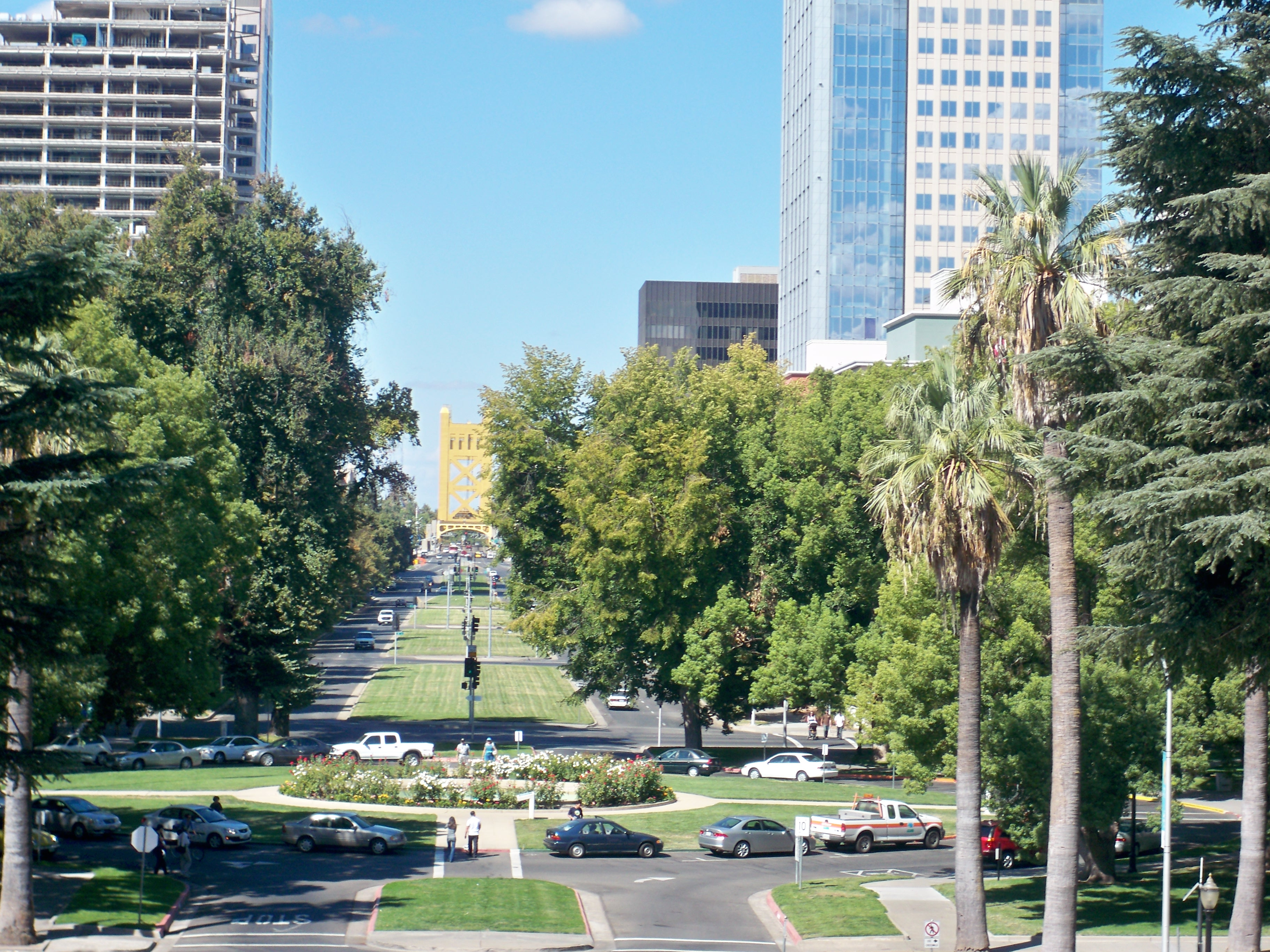 Capitol Mall